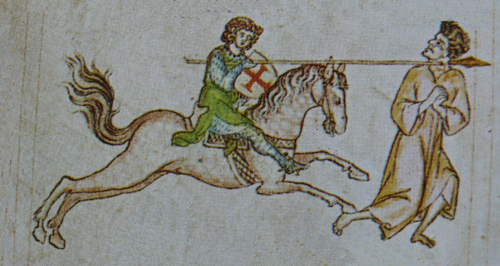 Rytíř